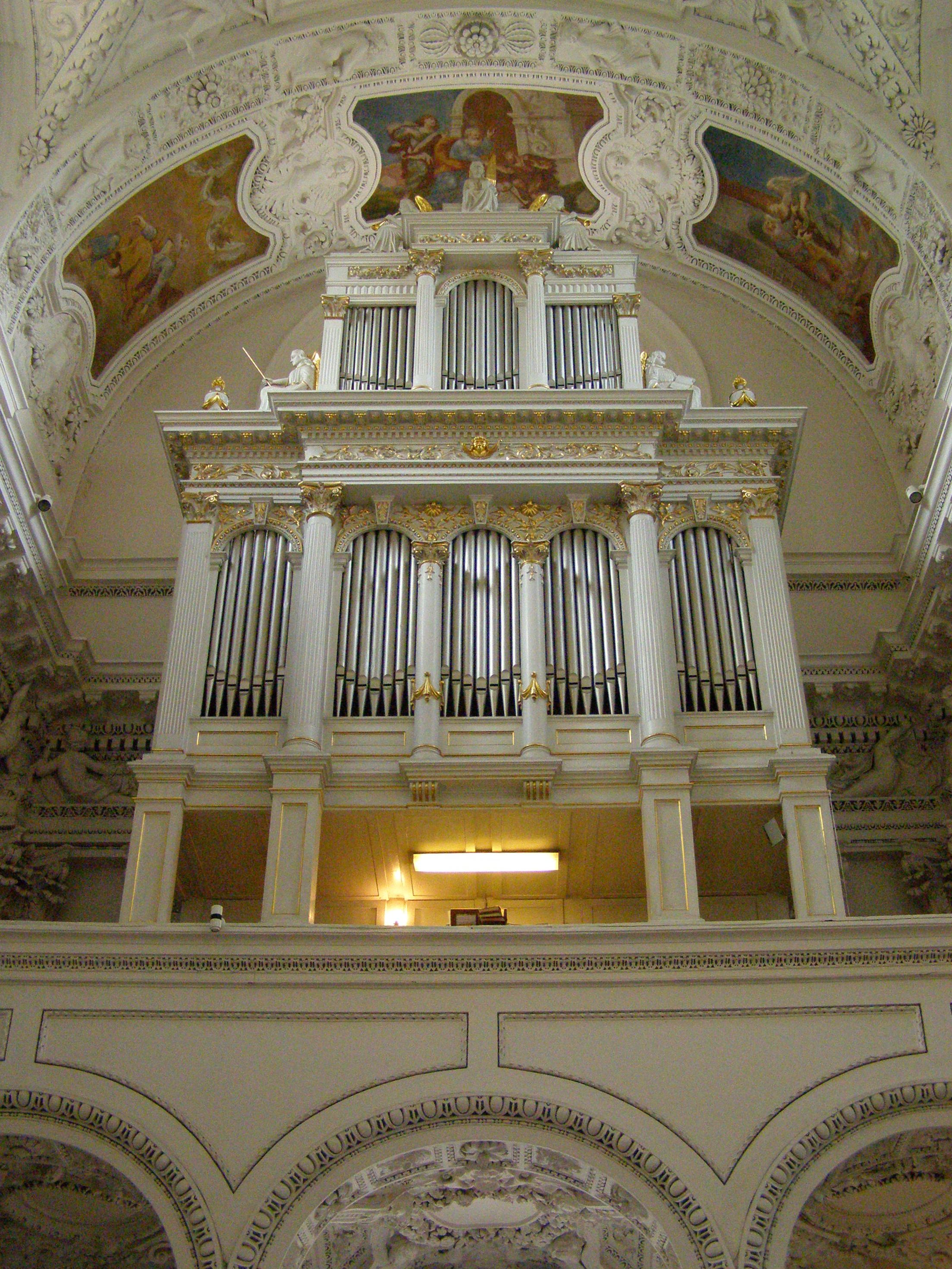 Organy w kościele św. Piotra i Pawła na Antokolu w Wilnie